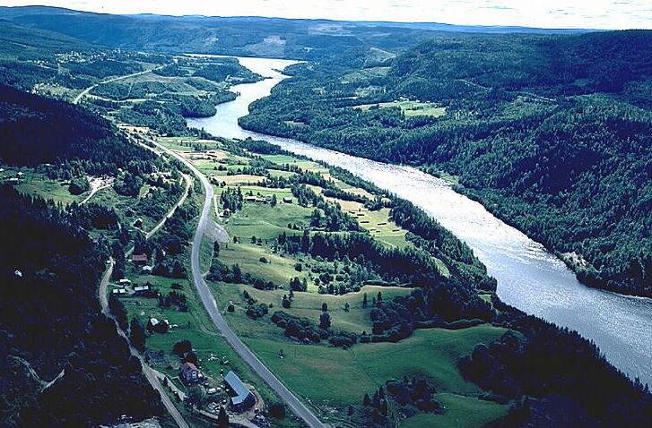 Indalen, området kring Indals kyrka mot sydöst. Bilden troligen från början av 1980-talet. Motiv: Indal socken Kategori: Insjömiljöer Indalen, området kring Indals kyrka mot sydöst. Bilden troligen från början av 1980-talet.